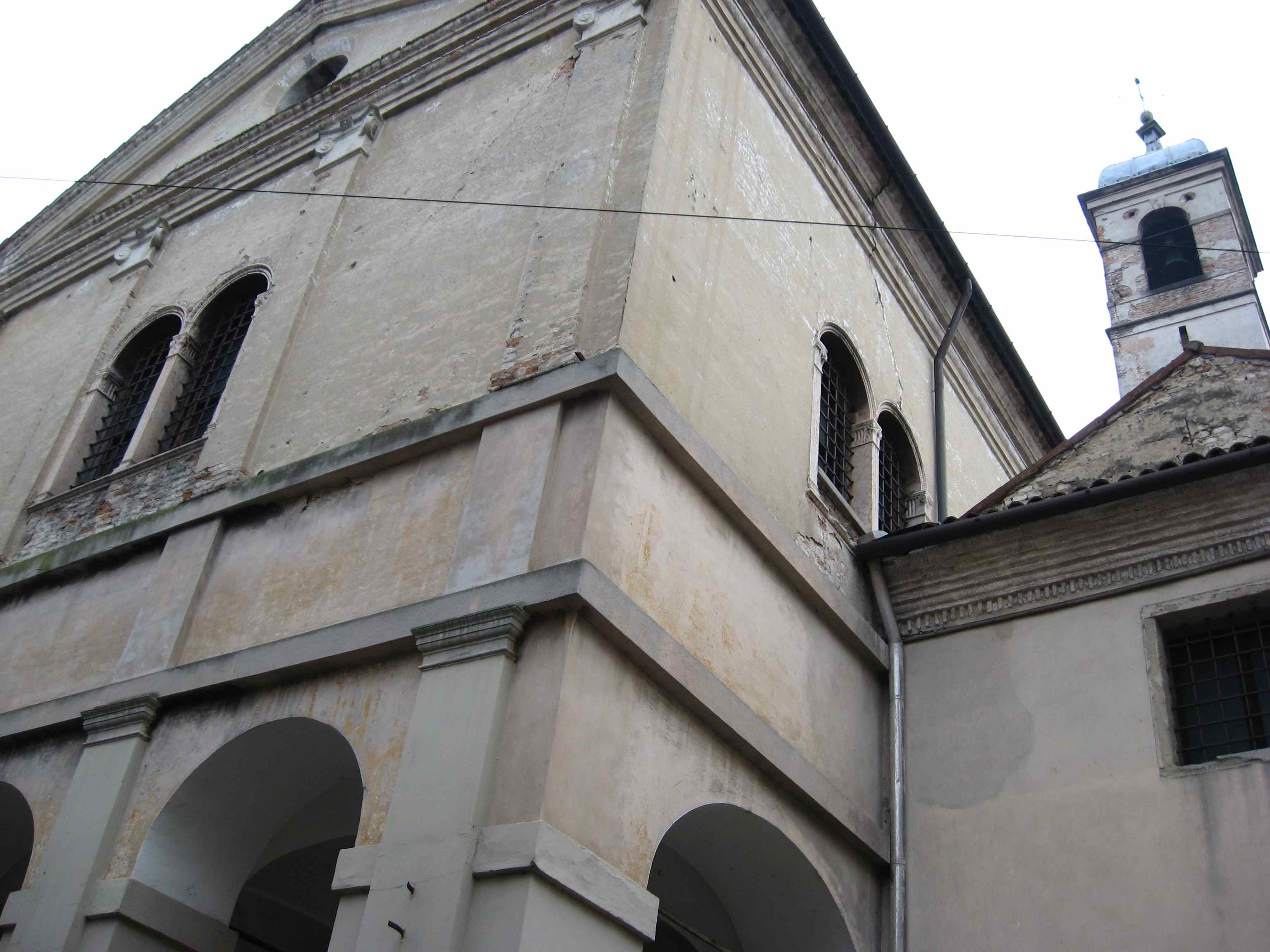 Chiesa S. Pietro Padova